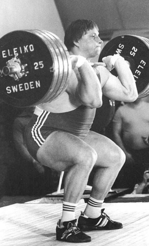 Benno Salzwedel ADN-ZB Hiekel 27.05.1985 VRP: Gewichtheber-EM-Im Superschwergewicht erkämpfte der 25jährige DDR-Athlet Senno Salzwedel die Bronzemedaille mit 417,5 kg im Zweikampf.-Foto von einem früheren Wettkampf